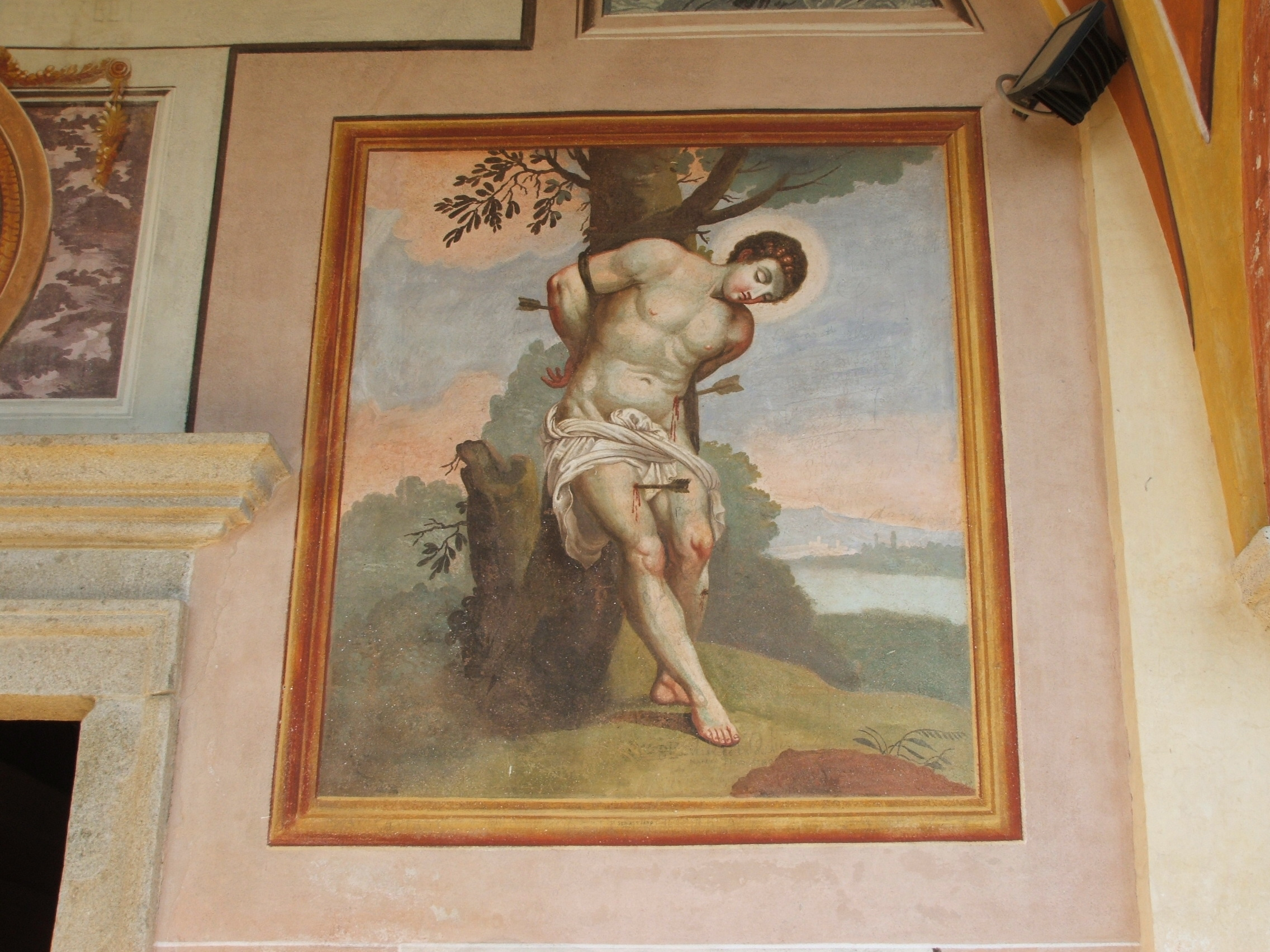 Immagine dal Santuario di Nostra Signora della Brughiera, presso Trivero (provincia di Biella, Piemonte, Italia) - Affresco raffigurante il martirio di San Sebastiano.